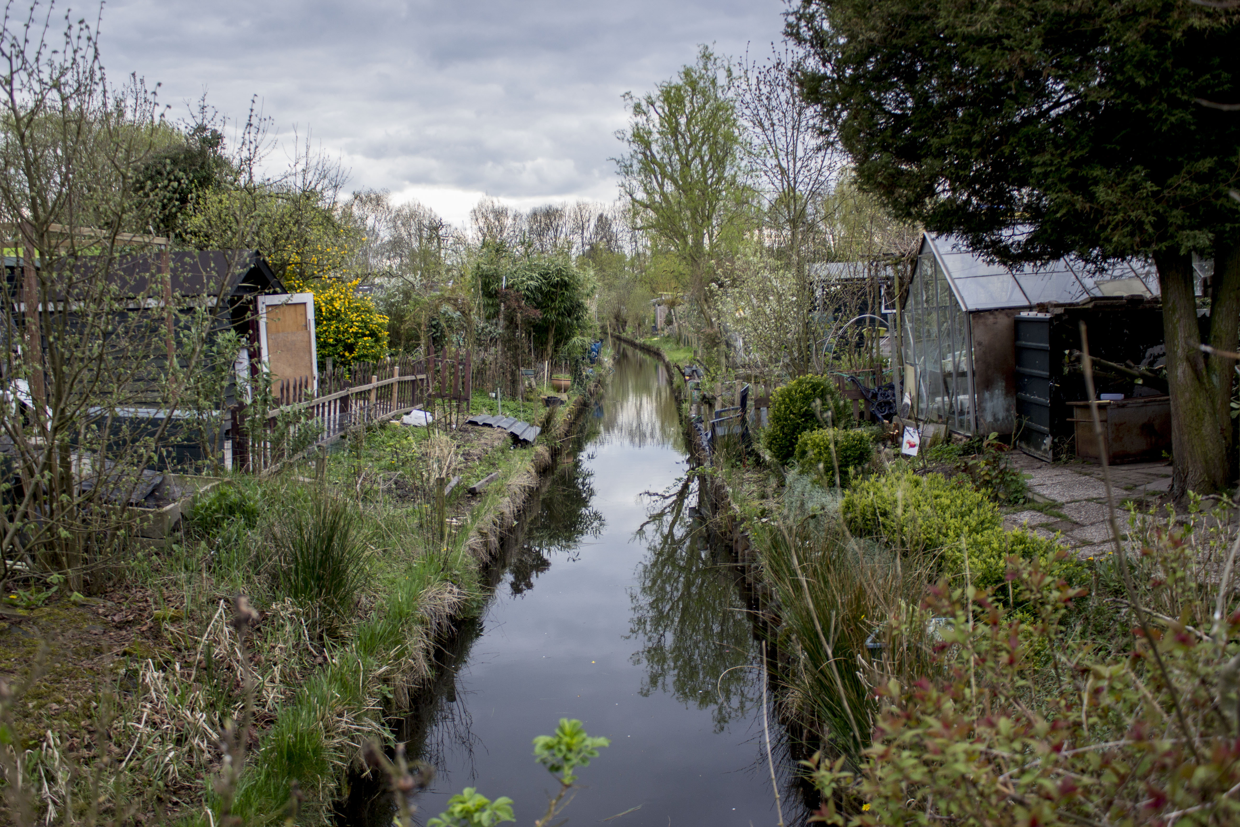 Natuur in de amateurtuindersvereniging Utrecht-Zuid, Lunetten.